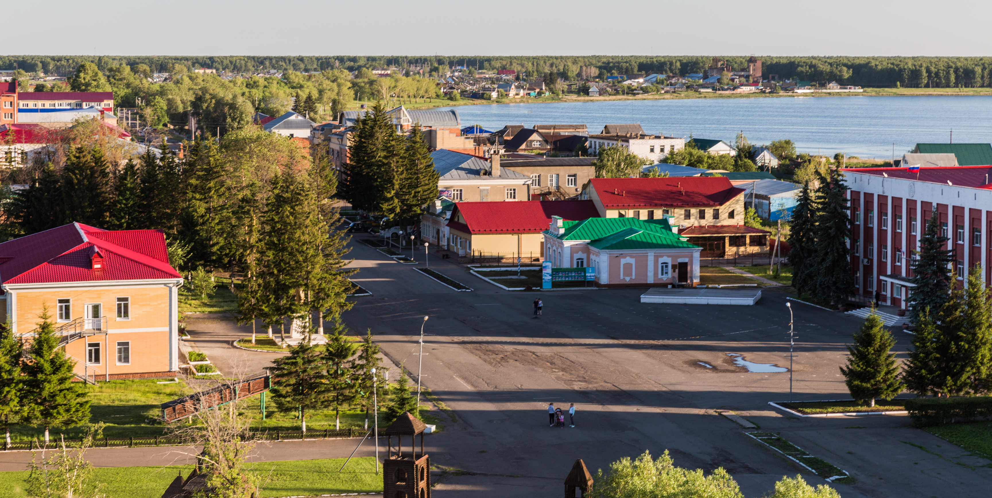 Tyukalinsk, Siberia